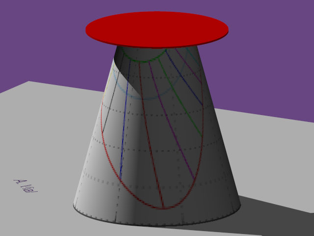 Cadran à chapeau à tronc cônique